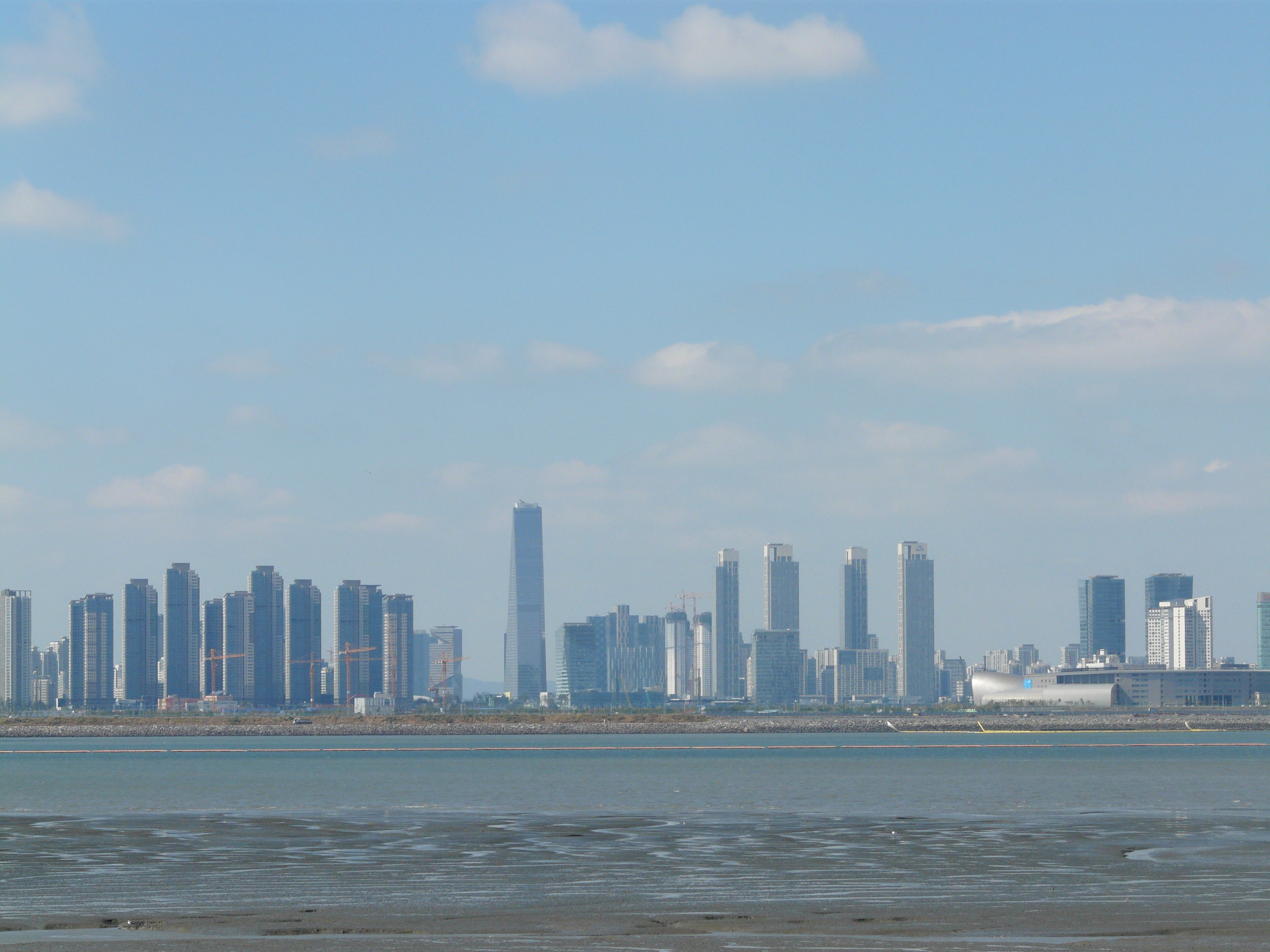 Siheung, October 2014